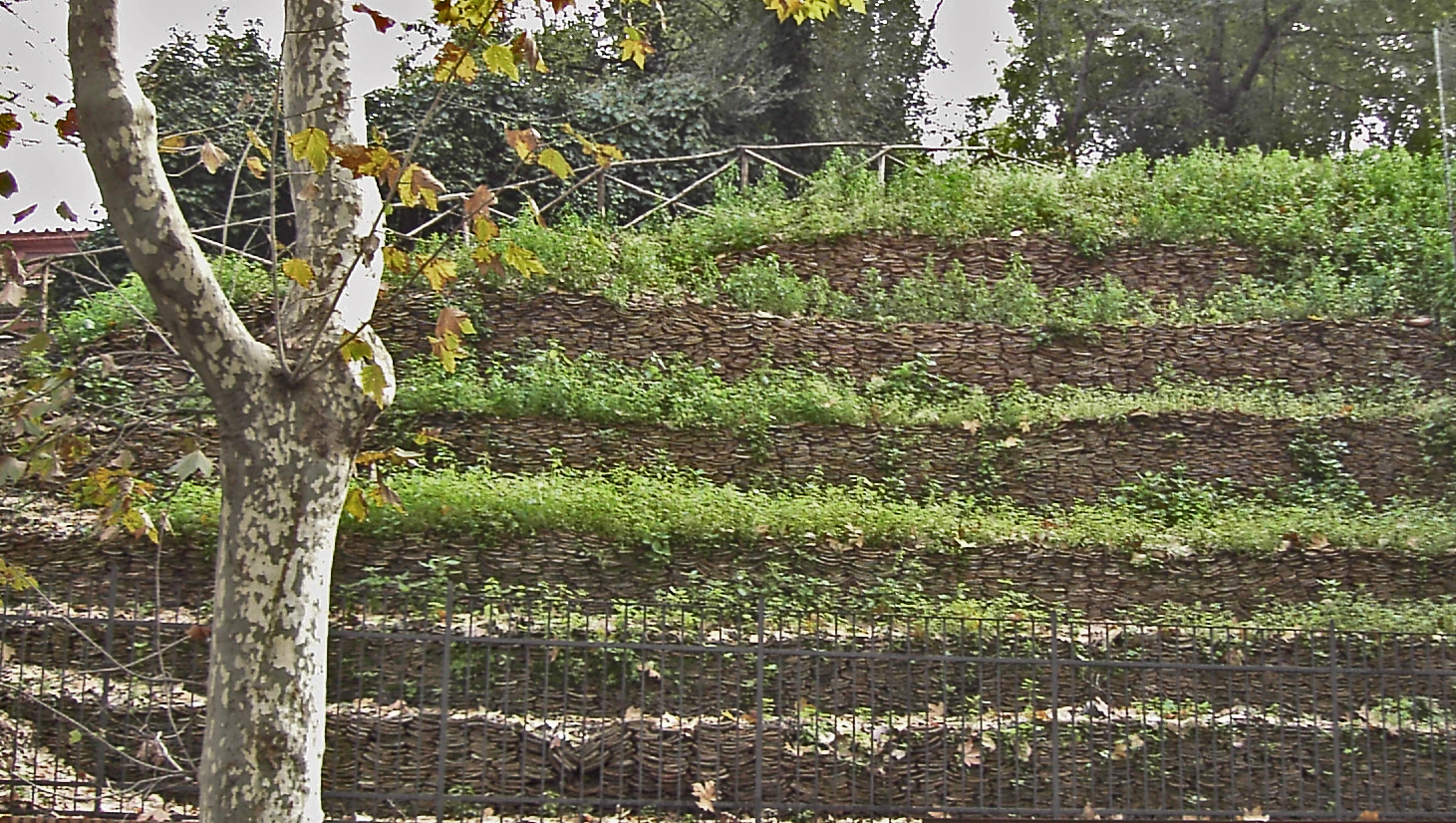 Roma, Testaccio: monte dei cocci su via Galvani